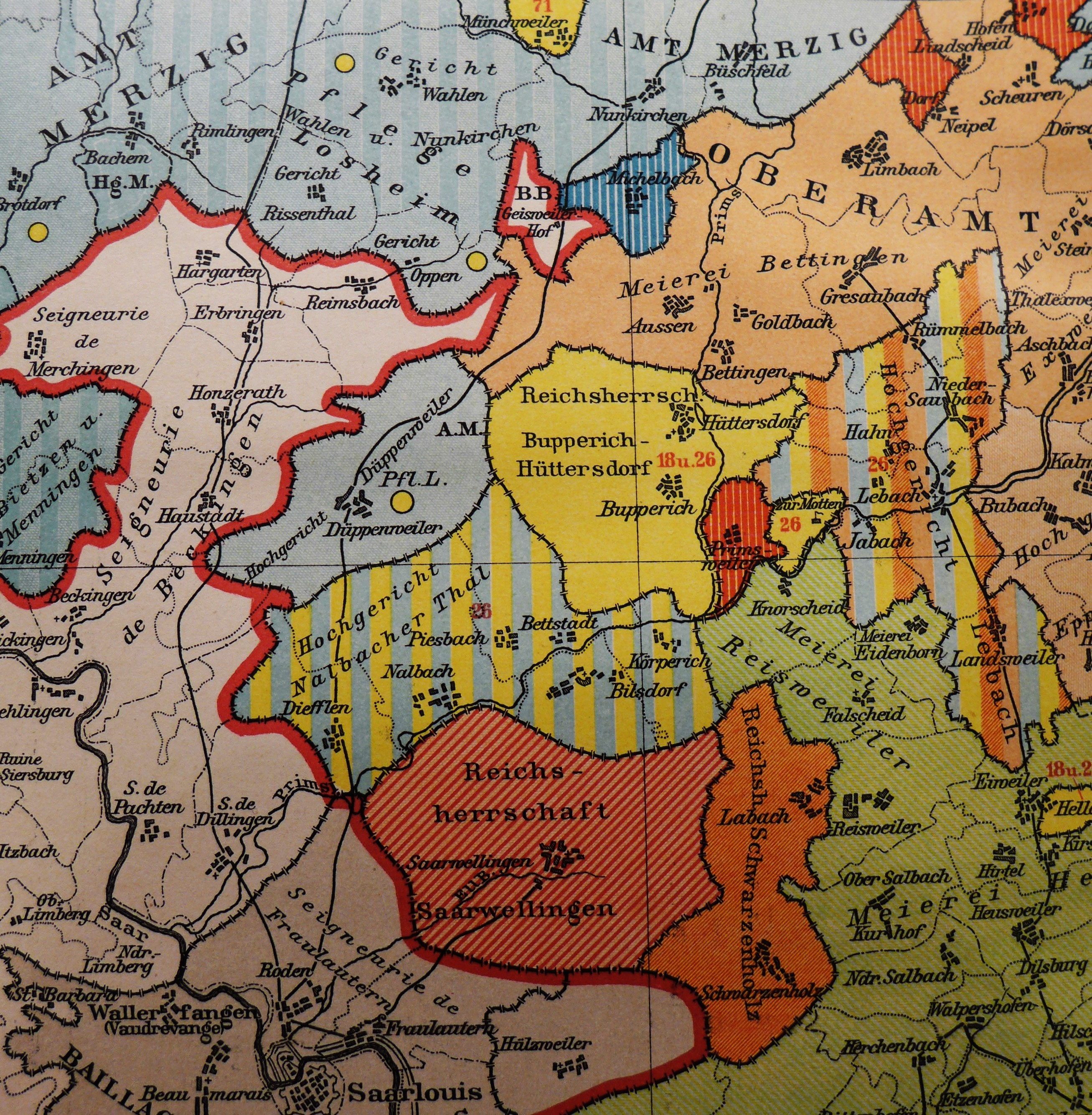 Grenzsituation zwischen dem Königreich Frankreich und dem Heiligen Römischen Reich deutscher Nation im Jahr 1789 (Gesellschaft für Rheinische Geschichtskunde nach Karte VI und VII des Geschichtlichen Atlas der Rheinprovinz von Wilhelm Fabricius)